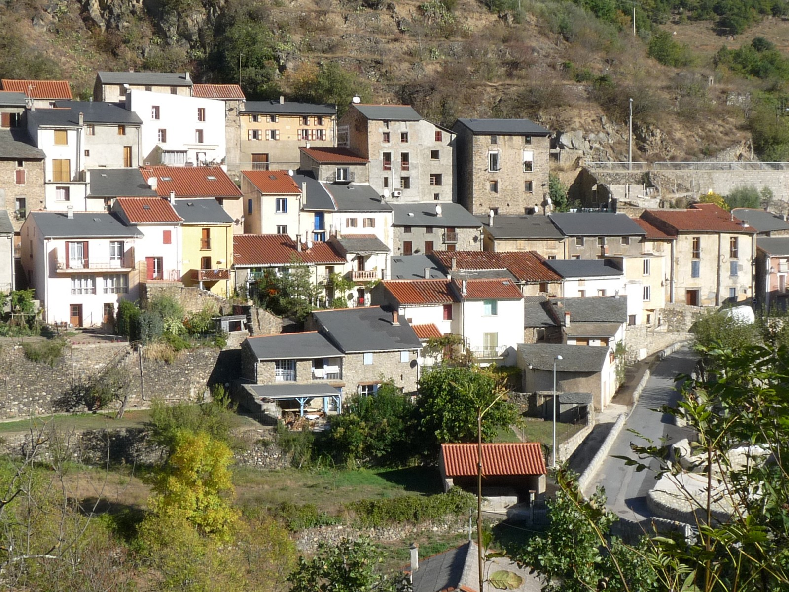 Vue de Serdinya, Pyrénées-Orientales, France